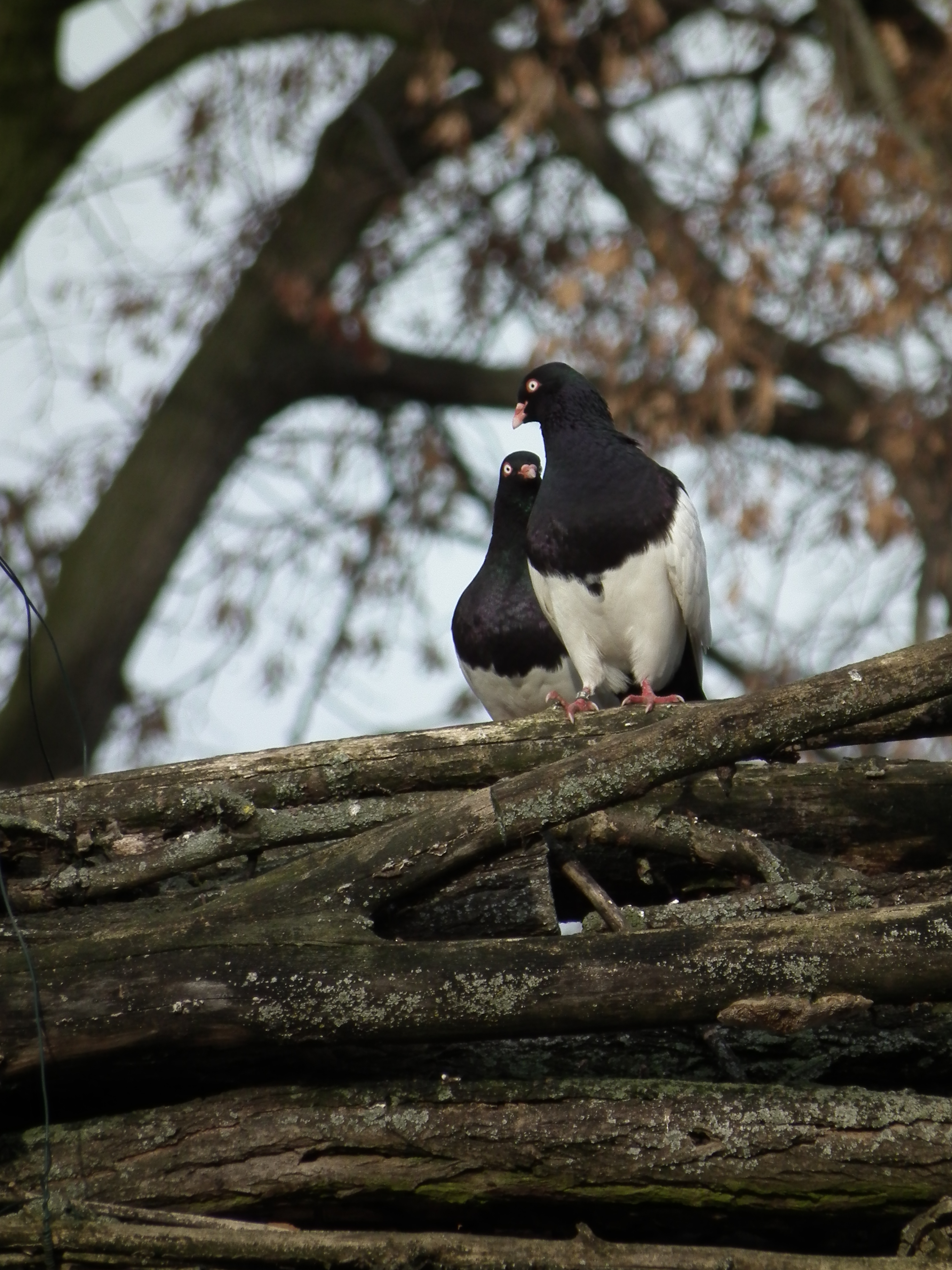 Blau-schwarz/weiße Haustauben, fotografiert in Heidelberg (Baden-Württemberg, Deutschland)